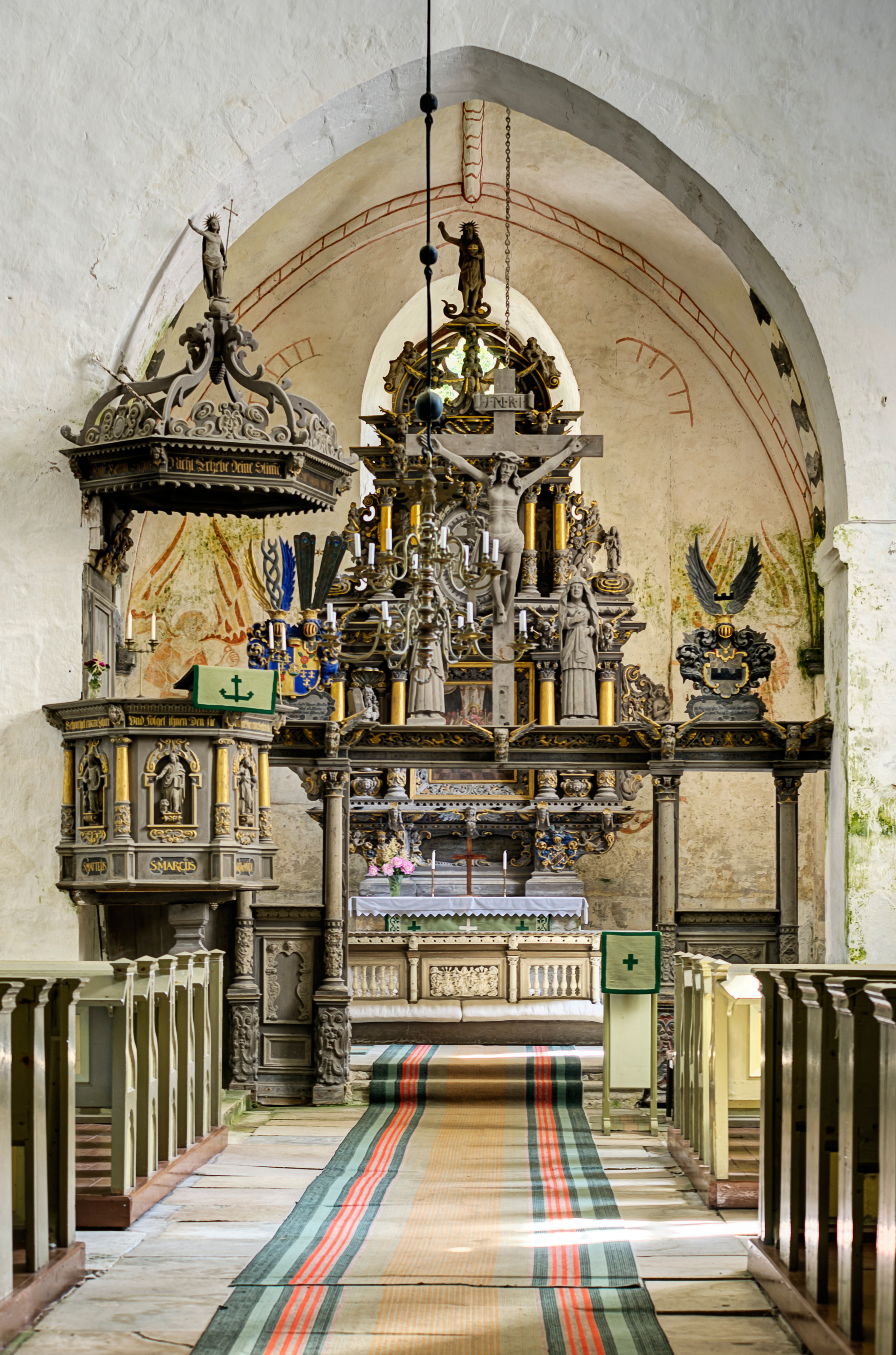 Võidukaare grupp ja vahevõre Ridala kirikus (B. Lorentz, 1678)